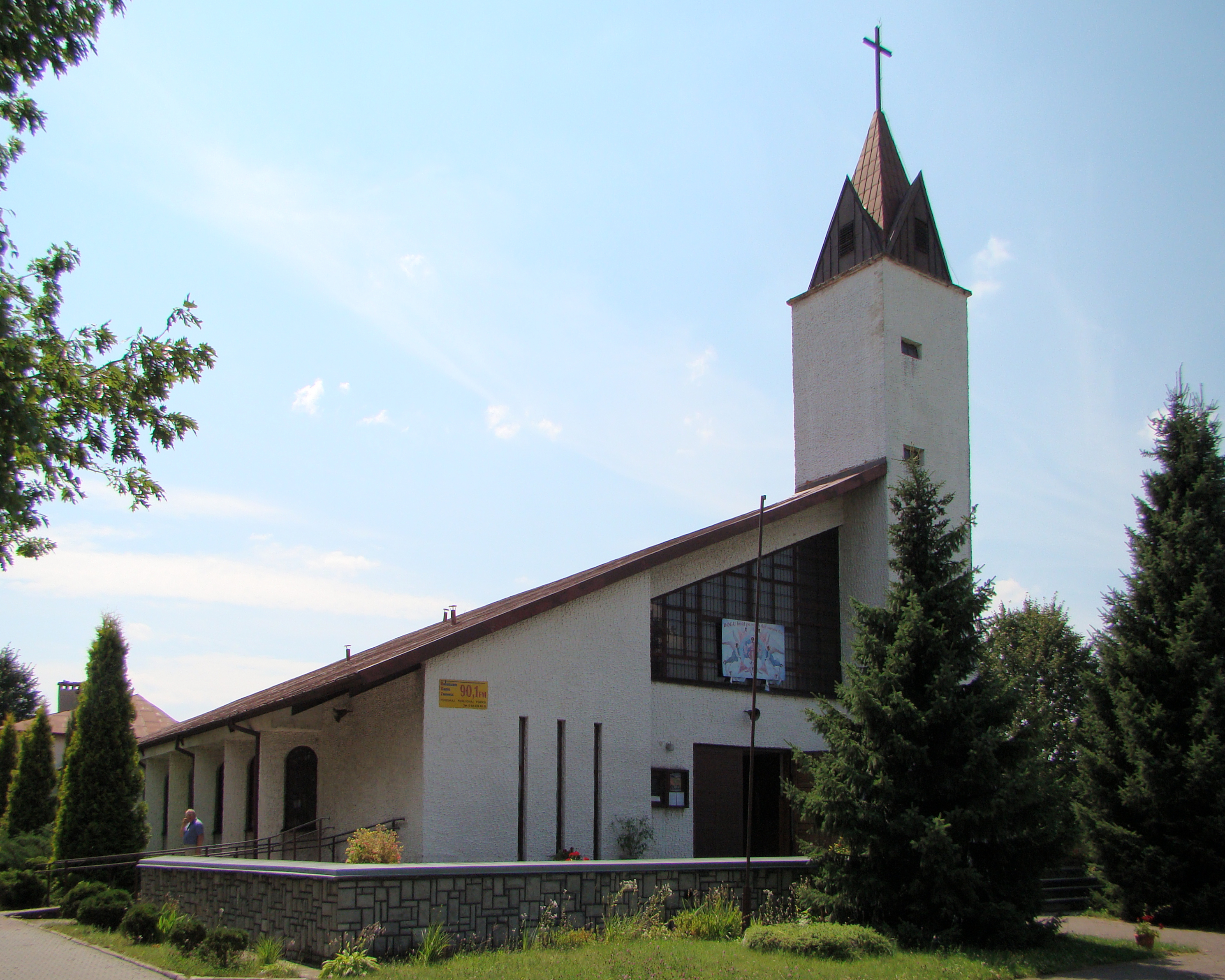 Złojec - kościół Chrystusa Króla